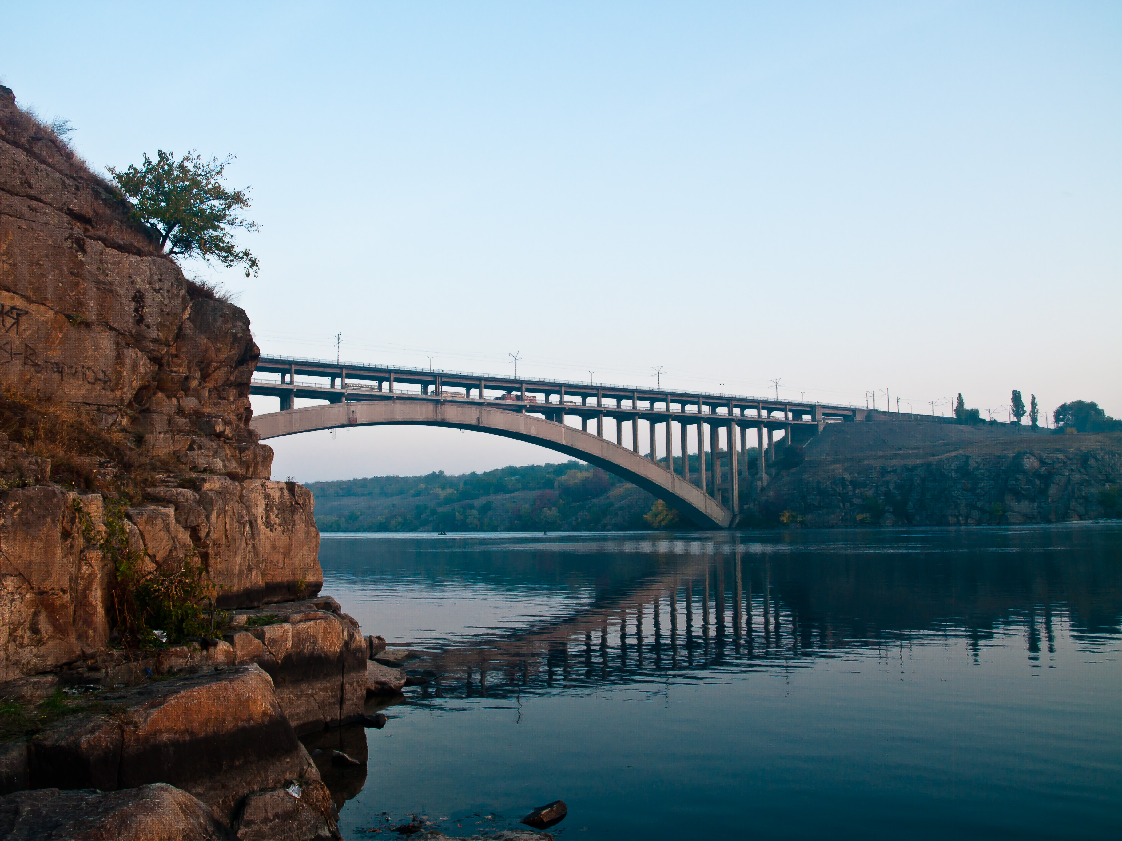 Мост Преображенського перед Хортицьким районом